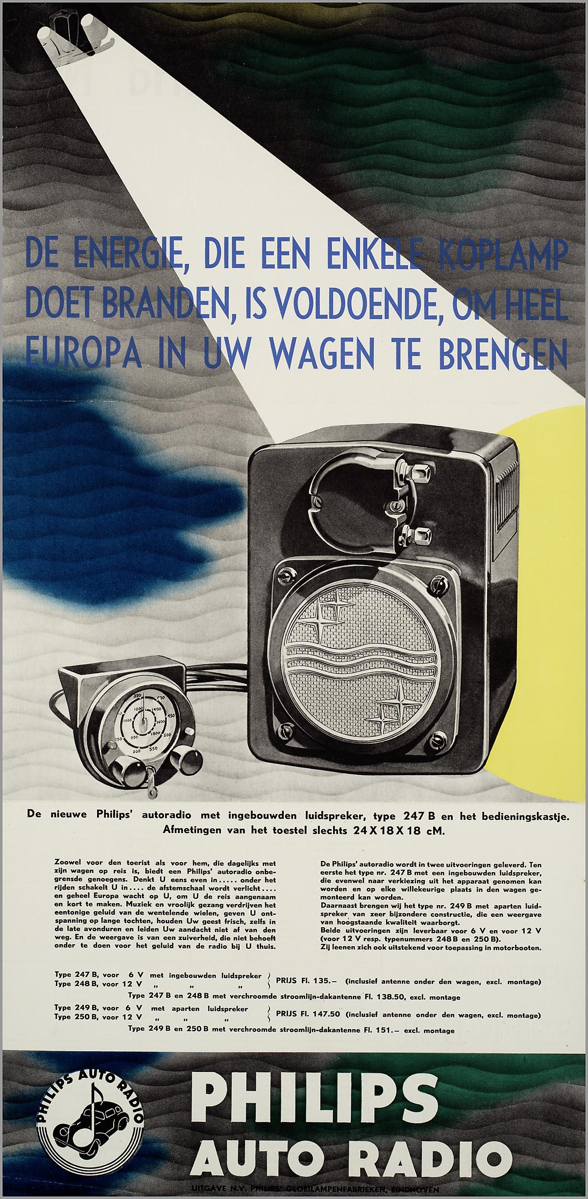 Reclamefolder:De energie, die een enkele koplamp doet branden, is voldoende, om heel Europa in uw wagen te brengen. Een Philips Autoradio veraangenaamt den rit en houdt den geest frisch